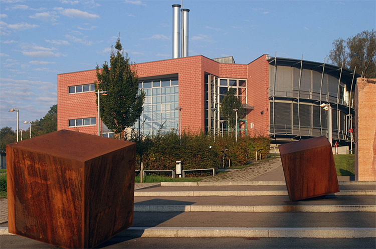 Anatomisches Institut, Medizinische Fakultät Tübingen